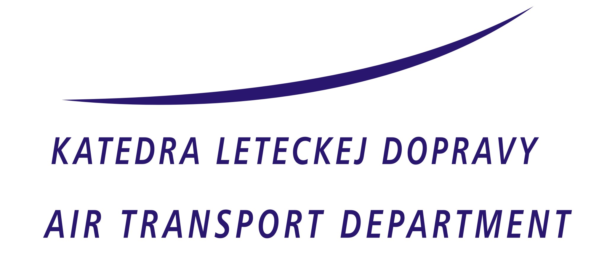 KLD Logo